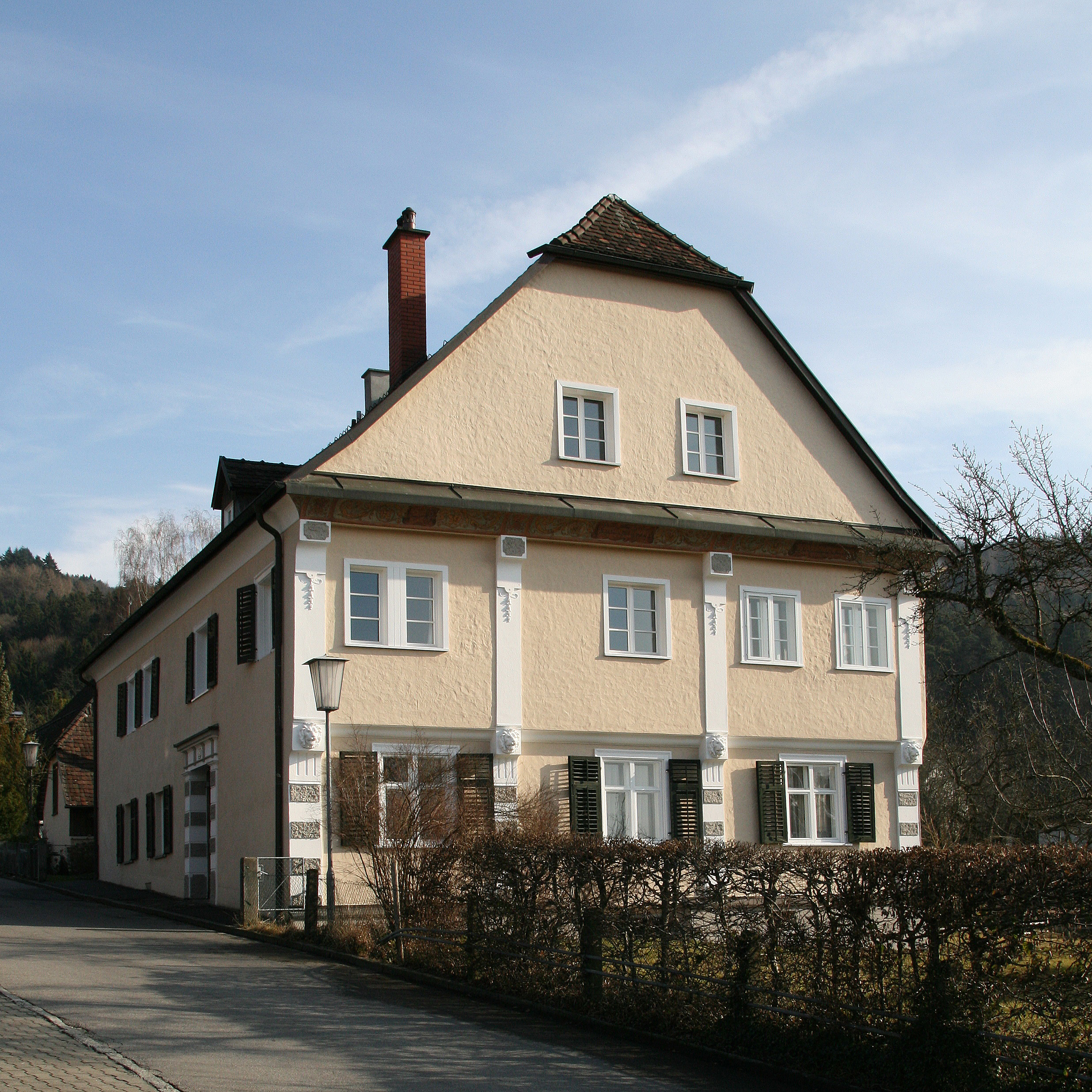 aus dem DEHIO Vorarlberg 1983: Mildenbergstrasse Nr. 1: Ansitz Grünholz Nr. 2: Ansitz Mildenberg, Nr. 11: Ansitz Lößler. *** Anm.: Alle Ansitze sehr "geschichtsträchtig" *** in der Oberstadt von Bregenz, Vorarlberg.